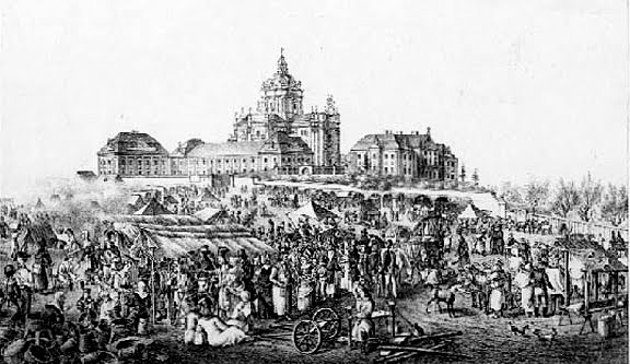 Ярмарок біля Собору святого Юра. Гравюра XIX століття.